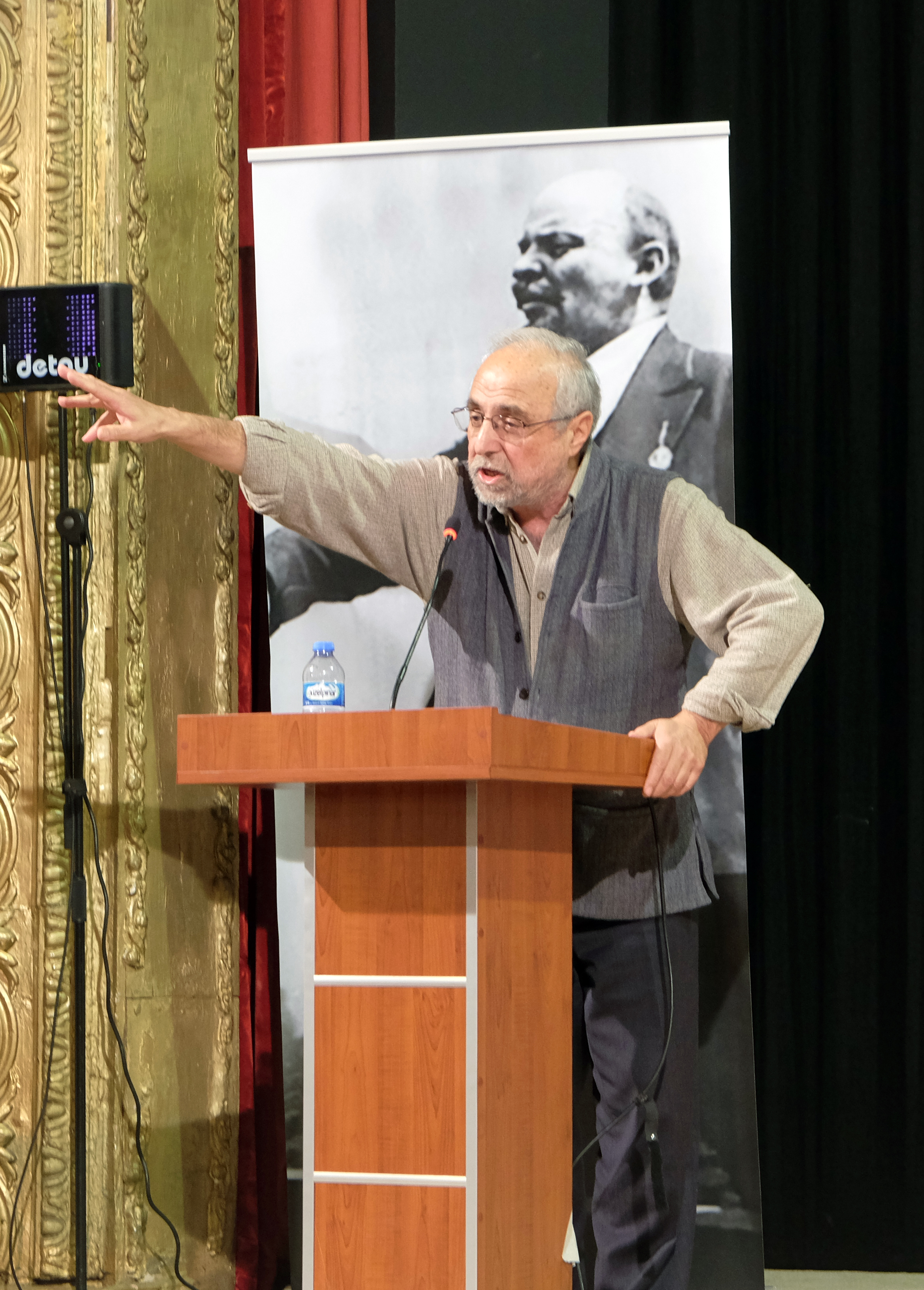 Sungur Savran, Ekim Devrimi'nin 100. yıl konferasında 3 Aralık 2017